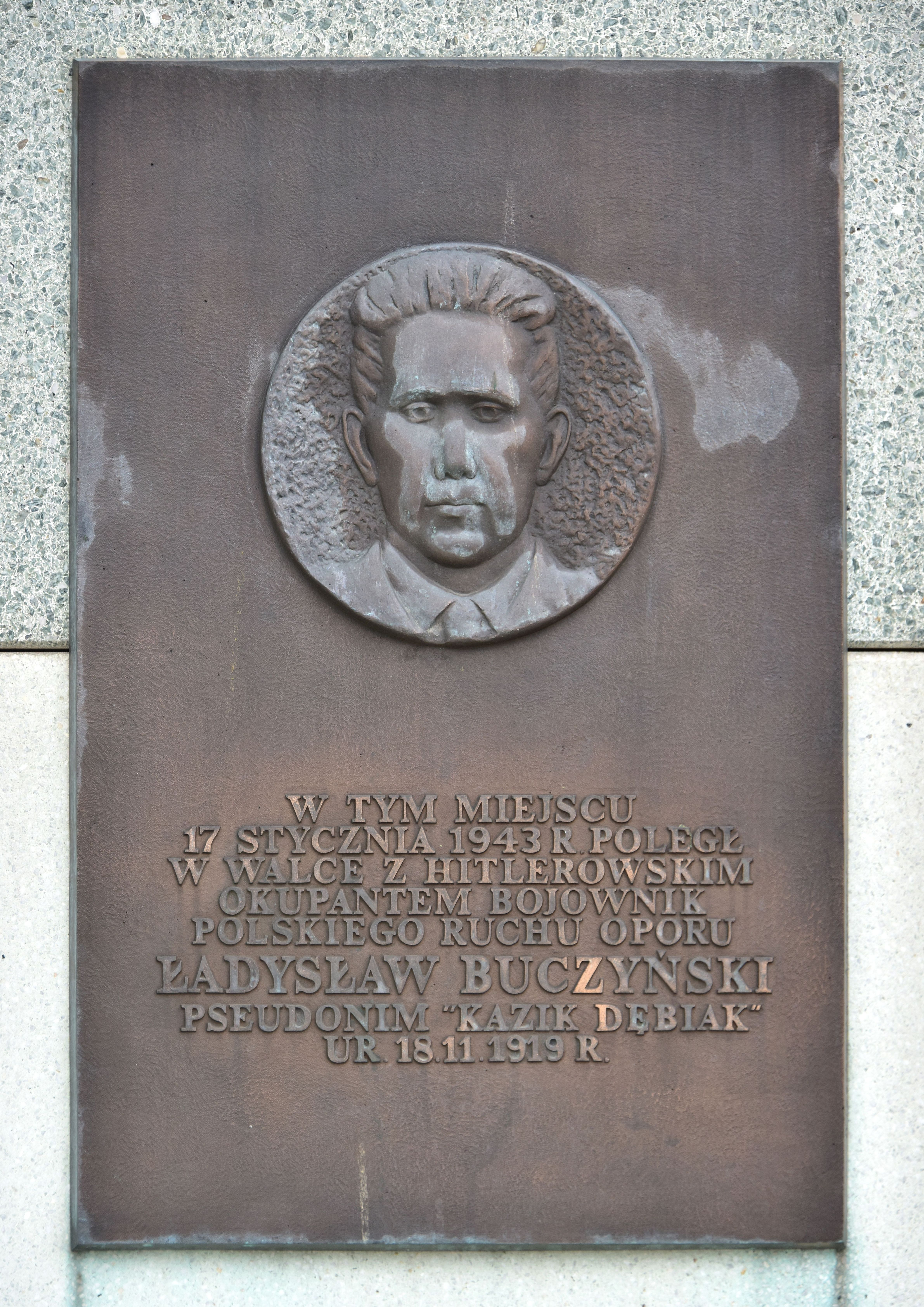 Tablica upamiętniająca Ładysława Buczyńskiego na fasadzie hotelu Sheraton w Warszawie